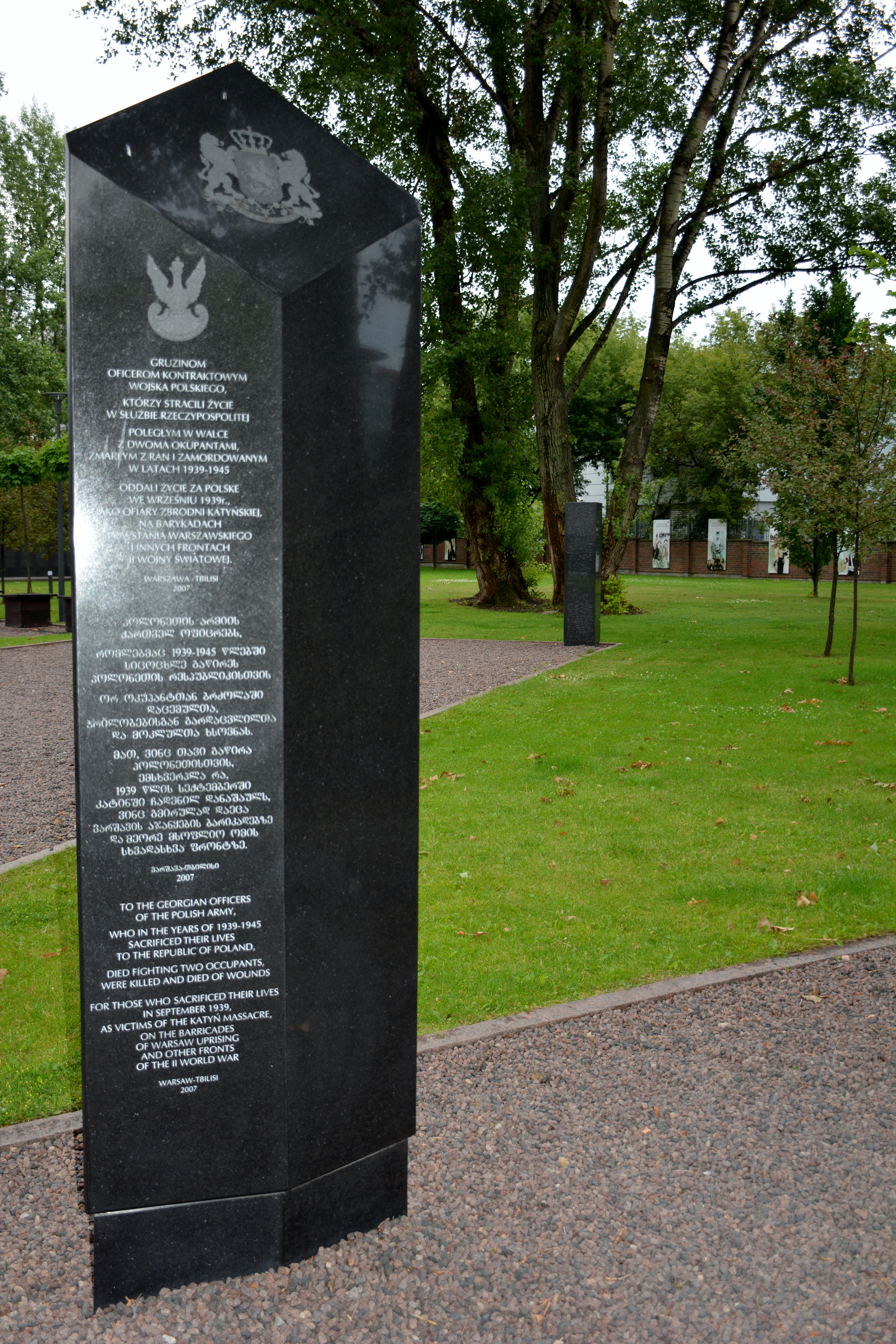 Czyste, Warsaw, Poland